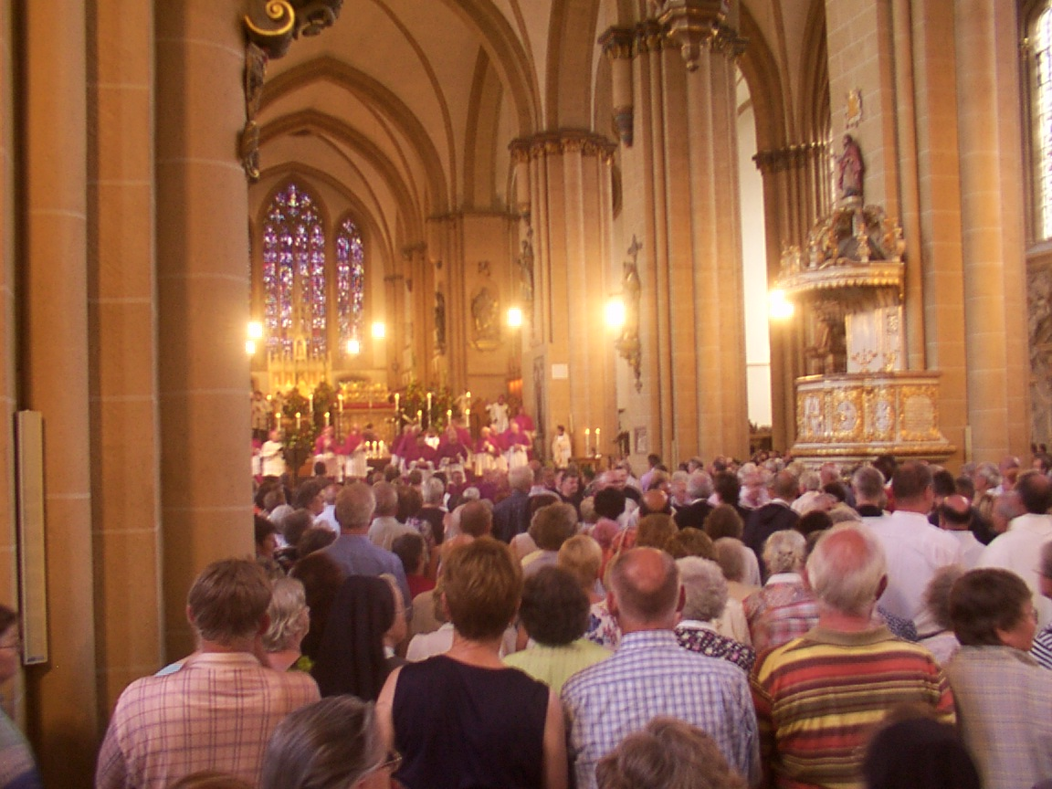 Libori 2006: Festandacht im Paderborner Dom am Liboridienstag